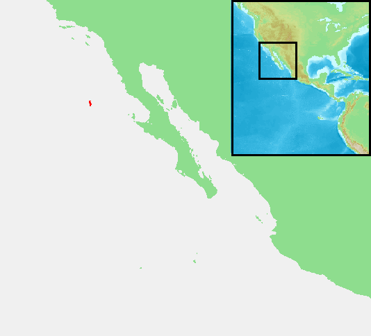 Guadalupe, Mexico